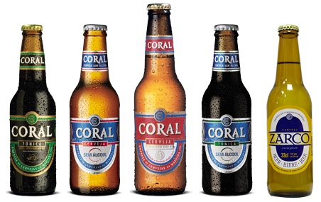 cervejas